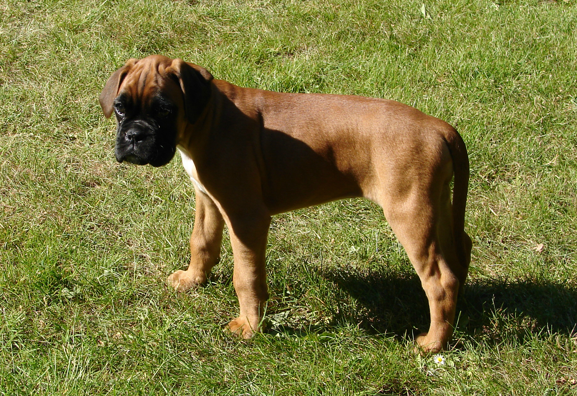 good dog